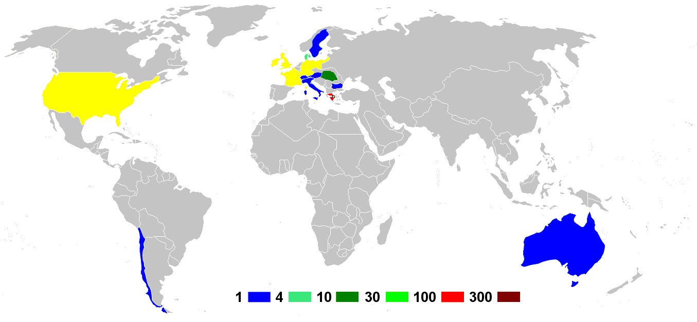 Antal utøvarar.